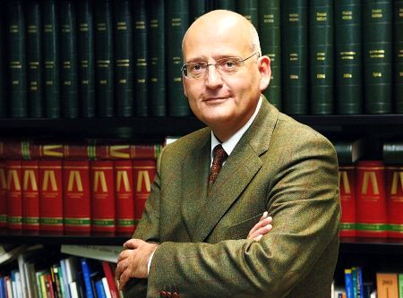 Retrato fotográfico de Pablo Gil Loyzaga